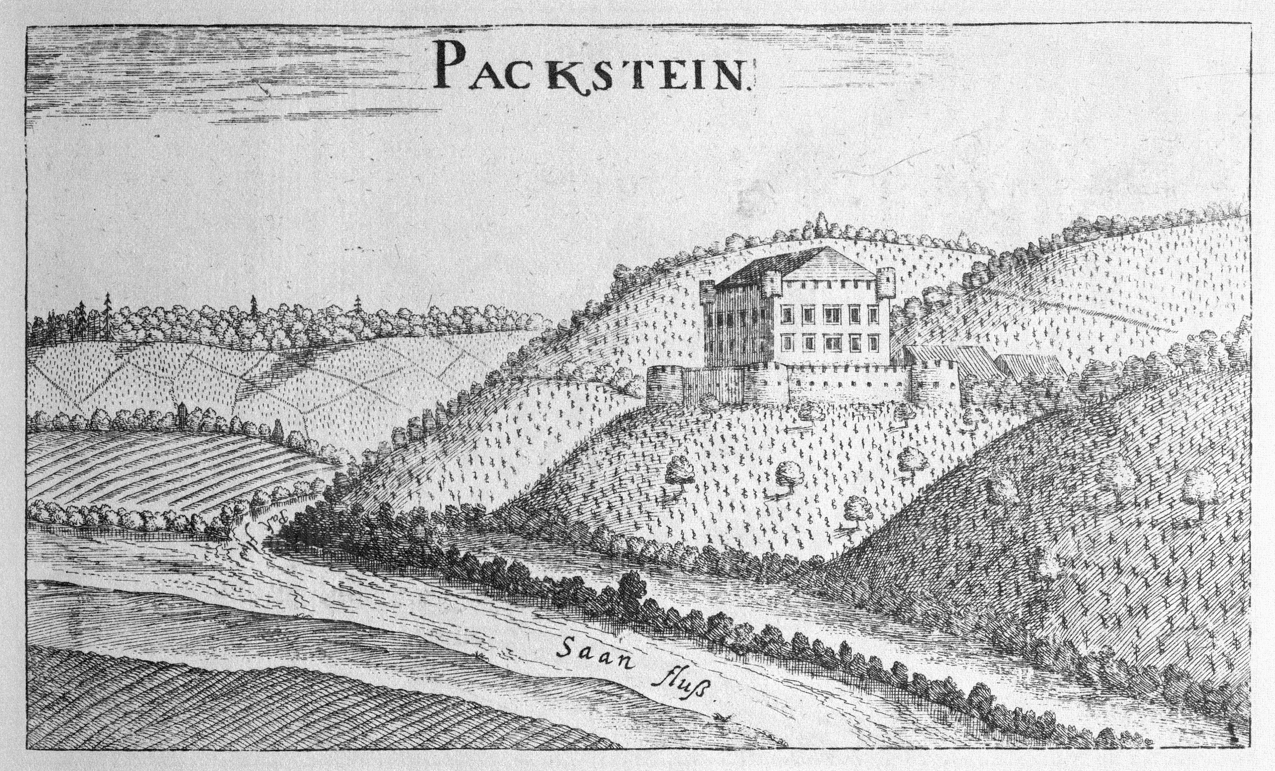 G. M. Vischers Käyserlichen Geographi, Topographia Ducatus Stiriae, Das ist: Eigentliche Delineation / und Abbildung aller Städte / Schlösser / Marcktfleck / Lustgärten / Probsteyen / Stiffter / Clöster und Kirchen / so es sich im Herzogthumb Steyrmarck befinden; Und anjetzo Umb einen billichen Preyß zu finden seynd Bey Johann Bitsch Universitäts Buchhandlern / Auff dem Juden=Platz bey der guldenen Saulen. Graz 1681 Die Nummerierung der Dateien folgt der alphabetischen Reihung der Ortsnamen und entspricht nicht dem Vischer-Register